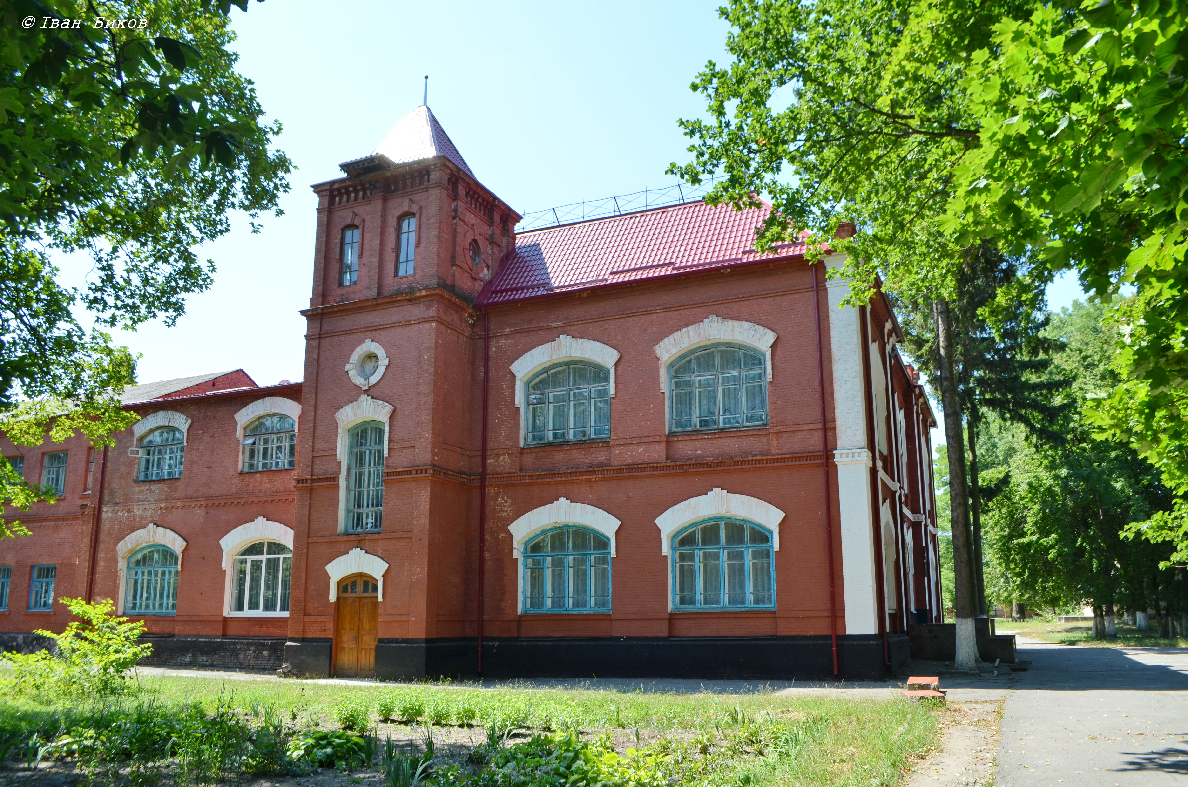 Розкішнянська ЗОШ I-III ступеня, село Розкішна, вул. Червоноармійська 7